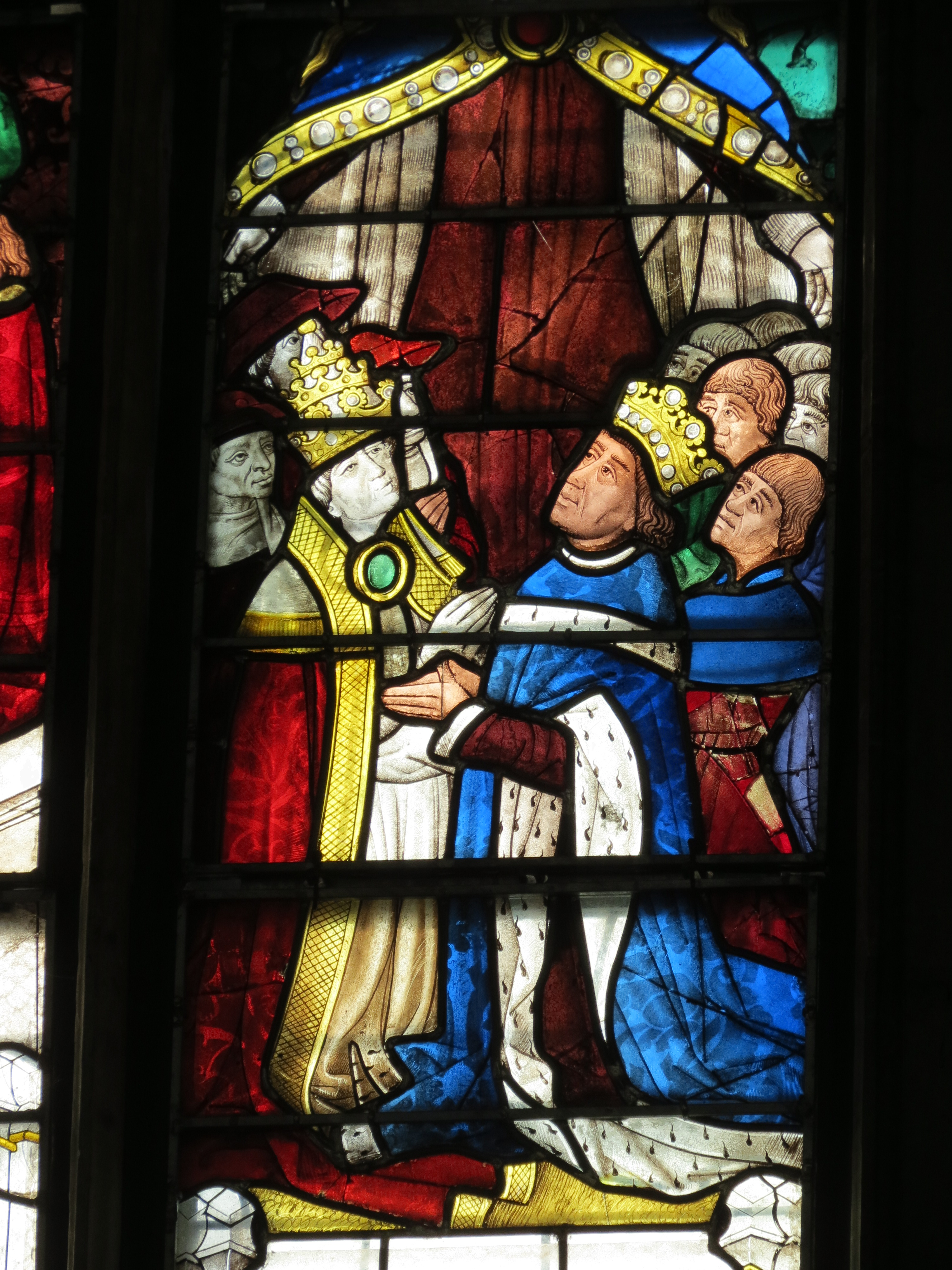 Le pape Paul II et le roi de France Louis XI se font face. Jean Balue se trouve derrière le pape.